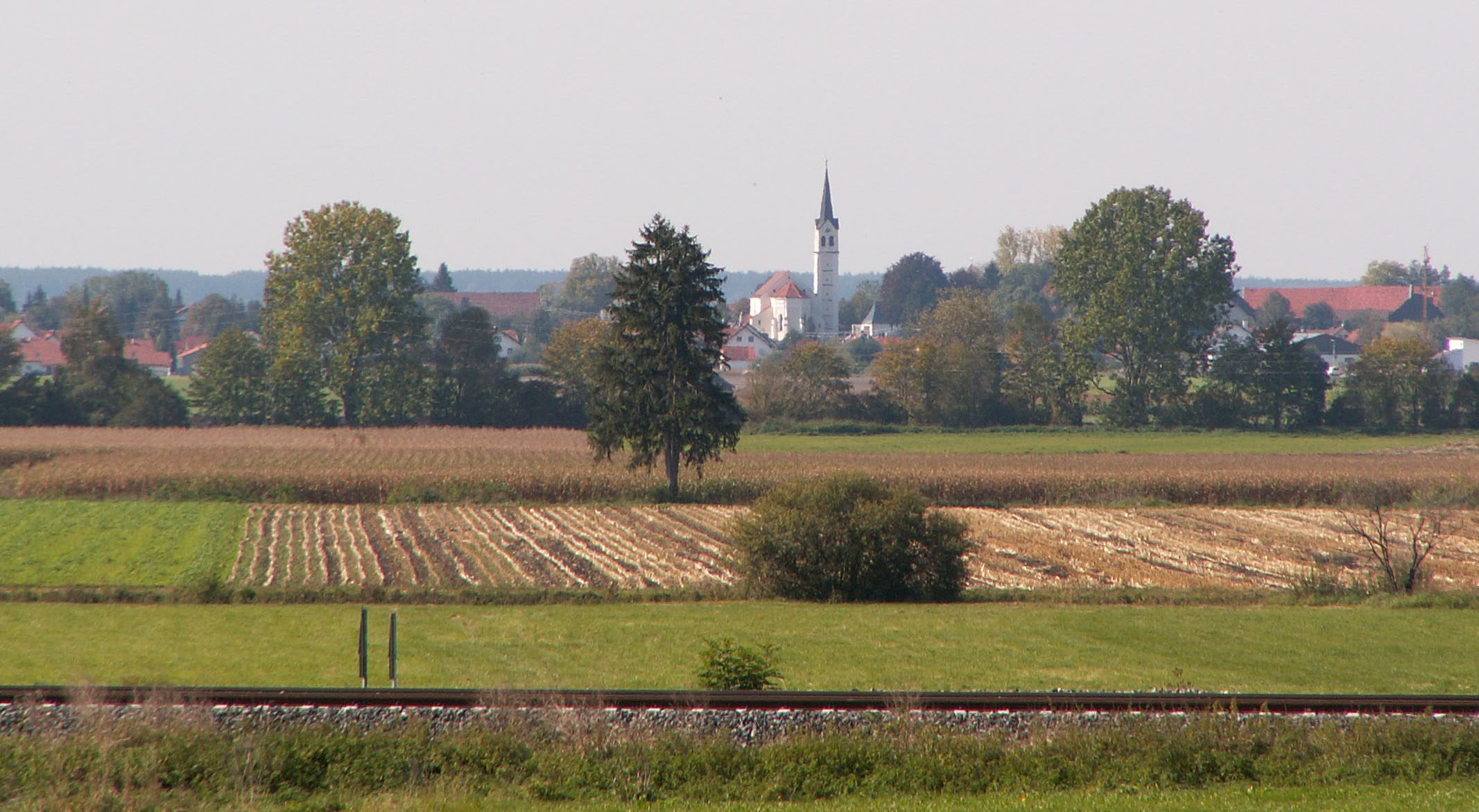 Amberg (Unterallgäu) von Osten